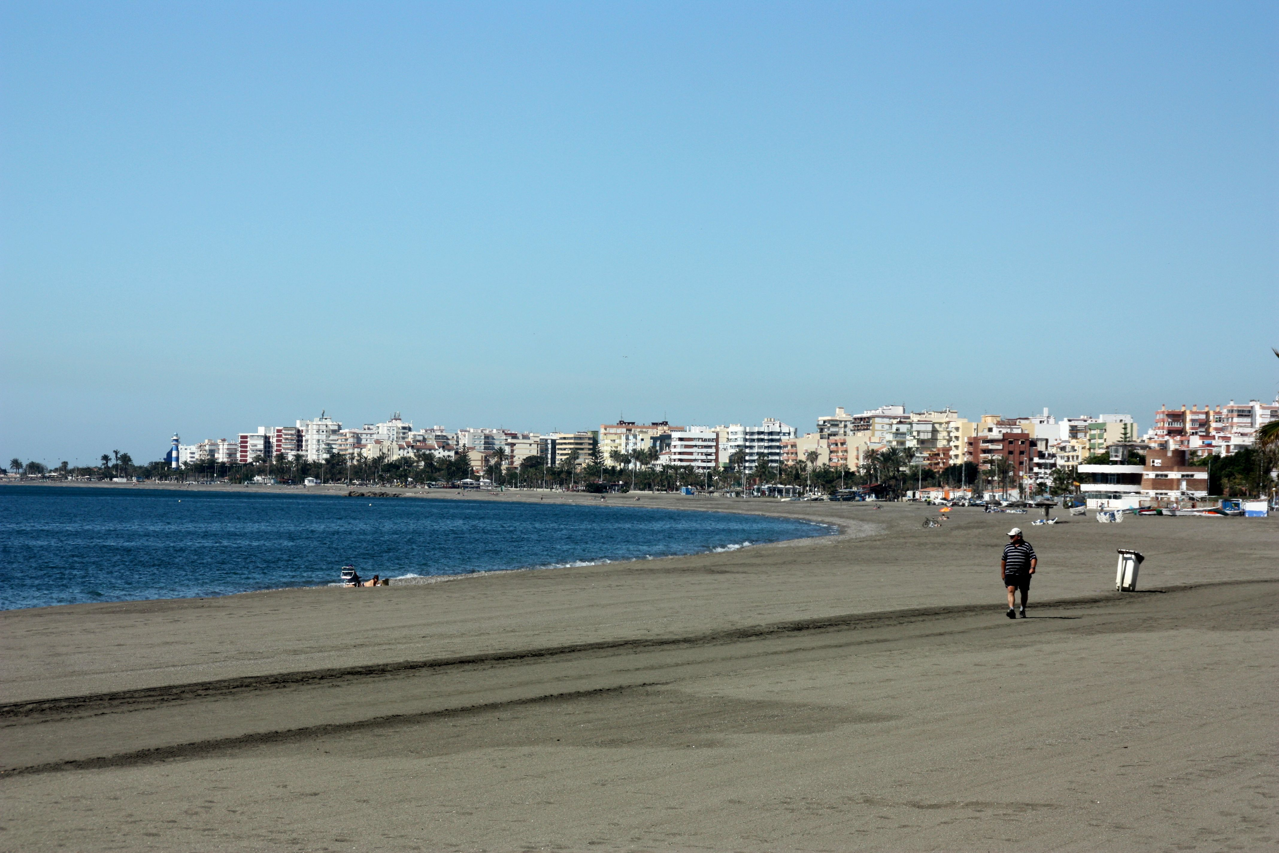 Blick auf Torre del Mar vom Sporthafen in Caléta de Velez